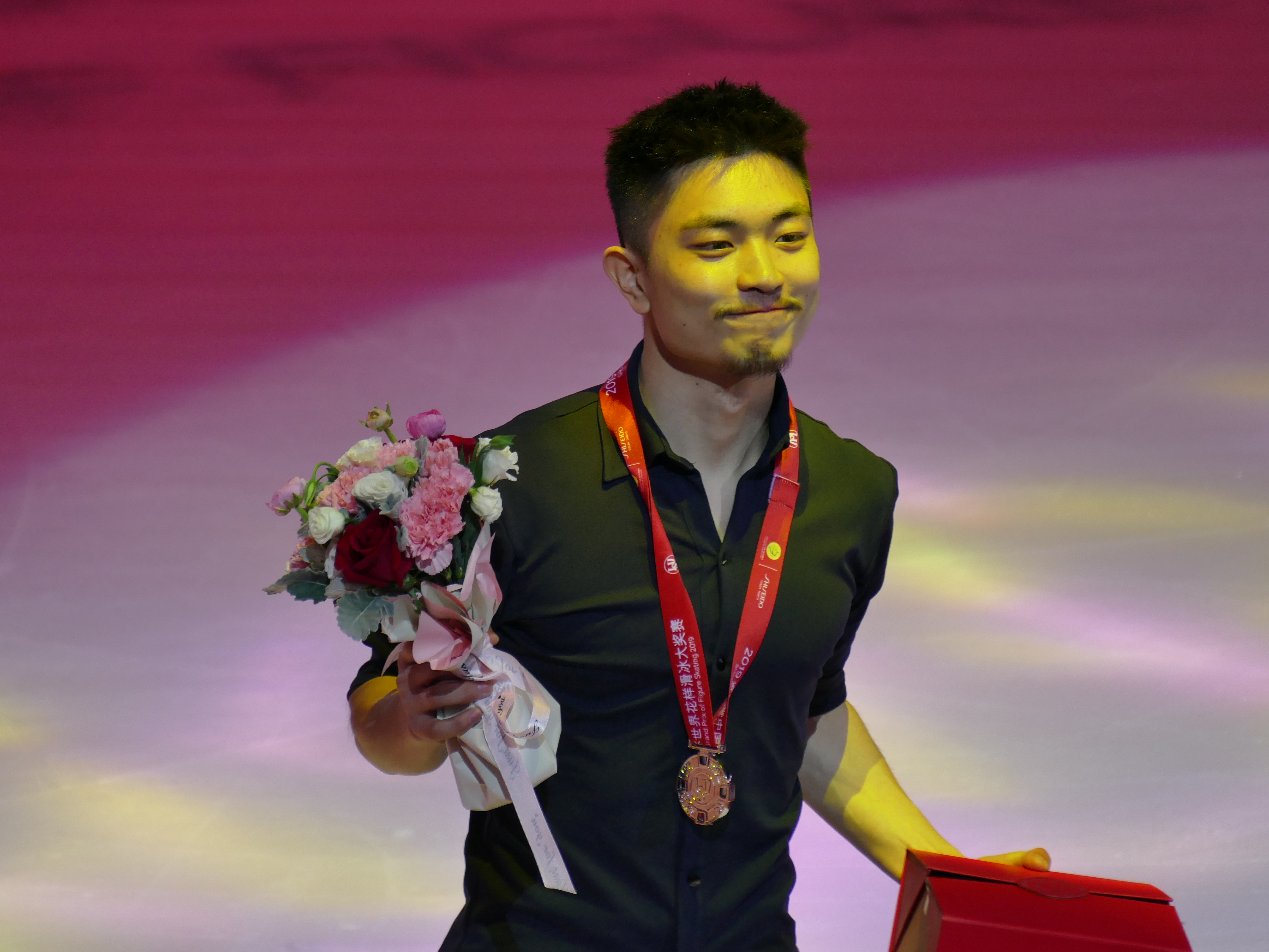 Han Yan 中国杯2019年